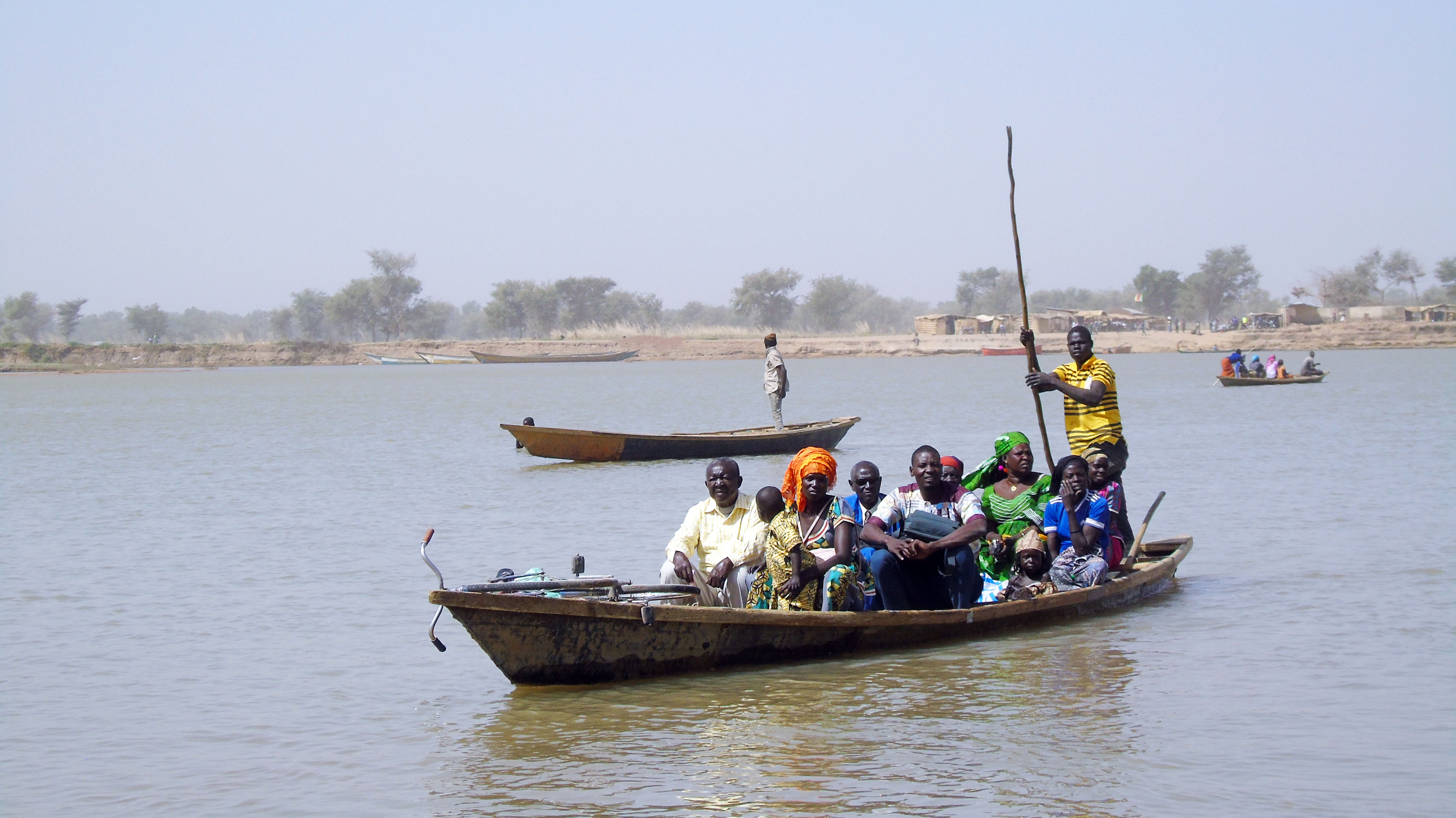 Le piroguier transporte des passagers sur le fleuve Logone entre Bongor(Tchad) et Yagoua(Cameroune) This is an image with the theme "Africa on the Move or Transport" from: Chad